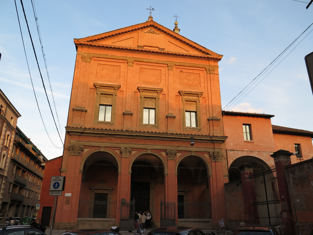 Chiesa Sussidiale di Santa Cristina This is a photo of a monument which is part of cultural heritage of Italy.